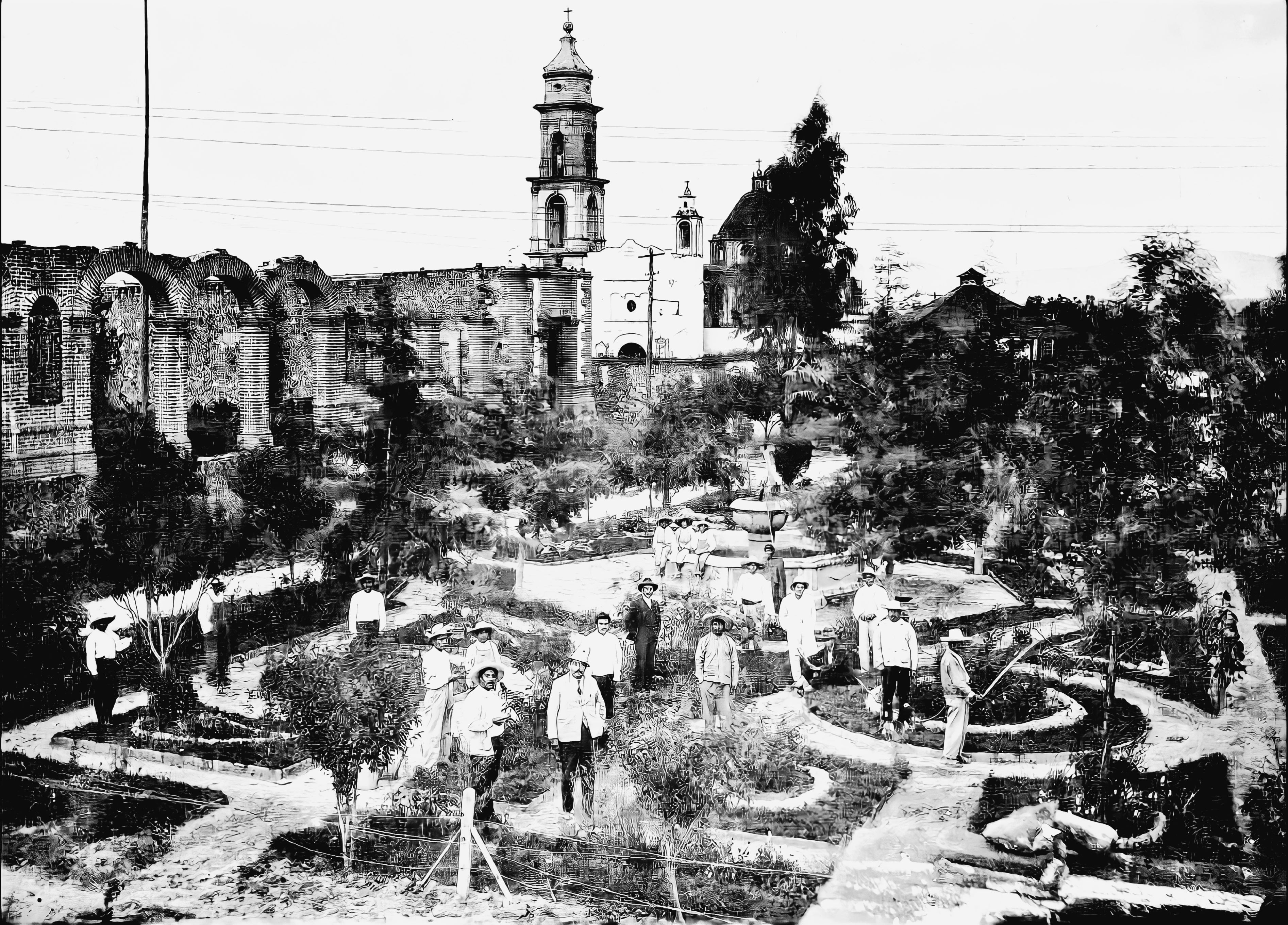 San Martín de las Pirámides, “Pueblo con Encanto del Bicentenarios”